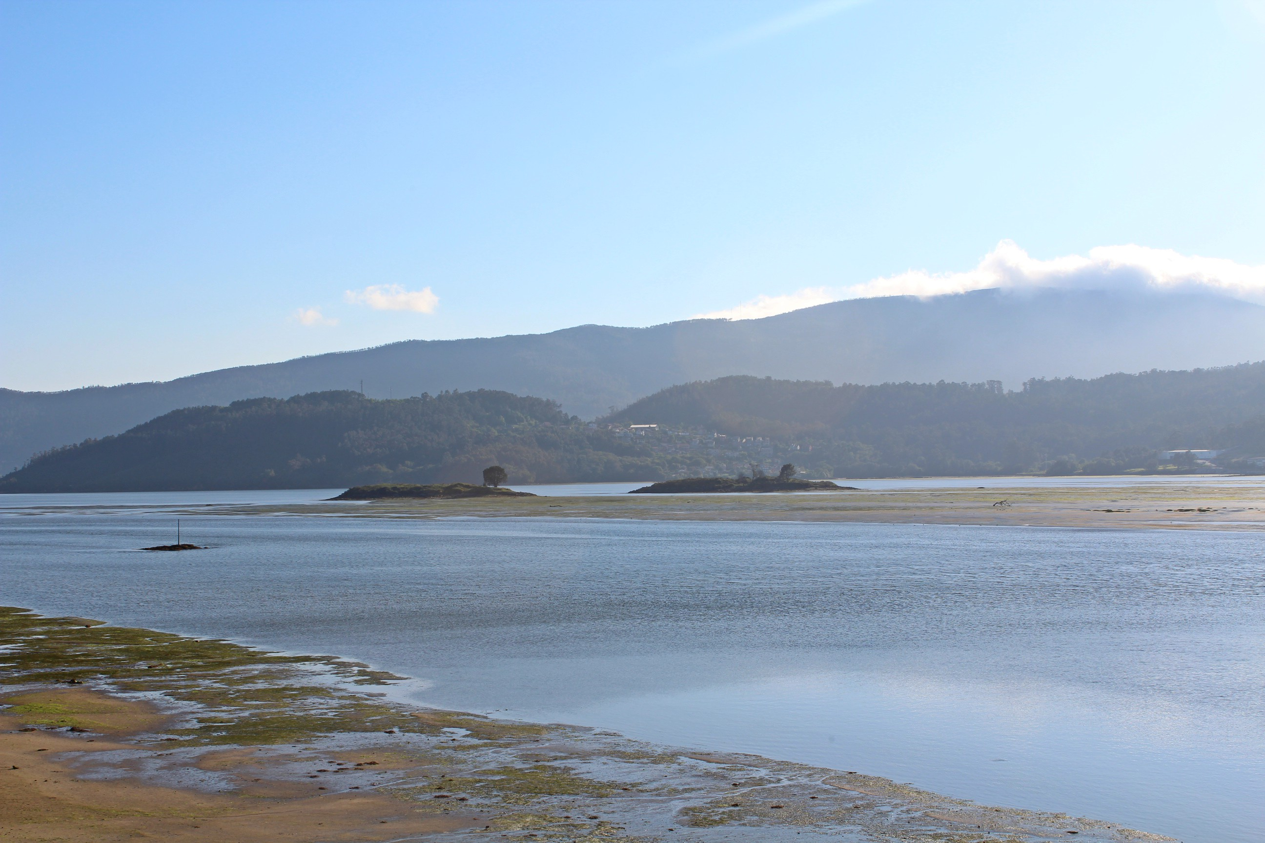 Illas Alvedosa